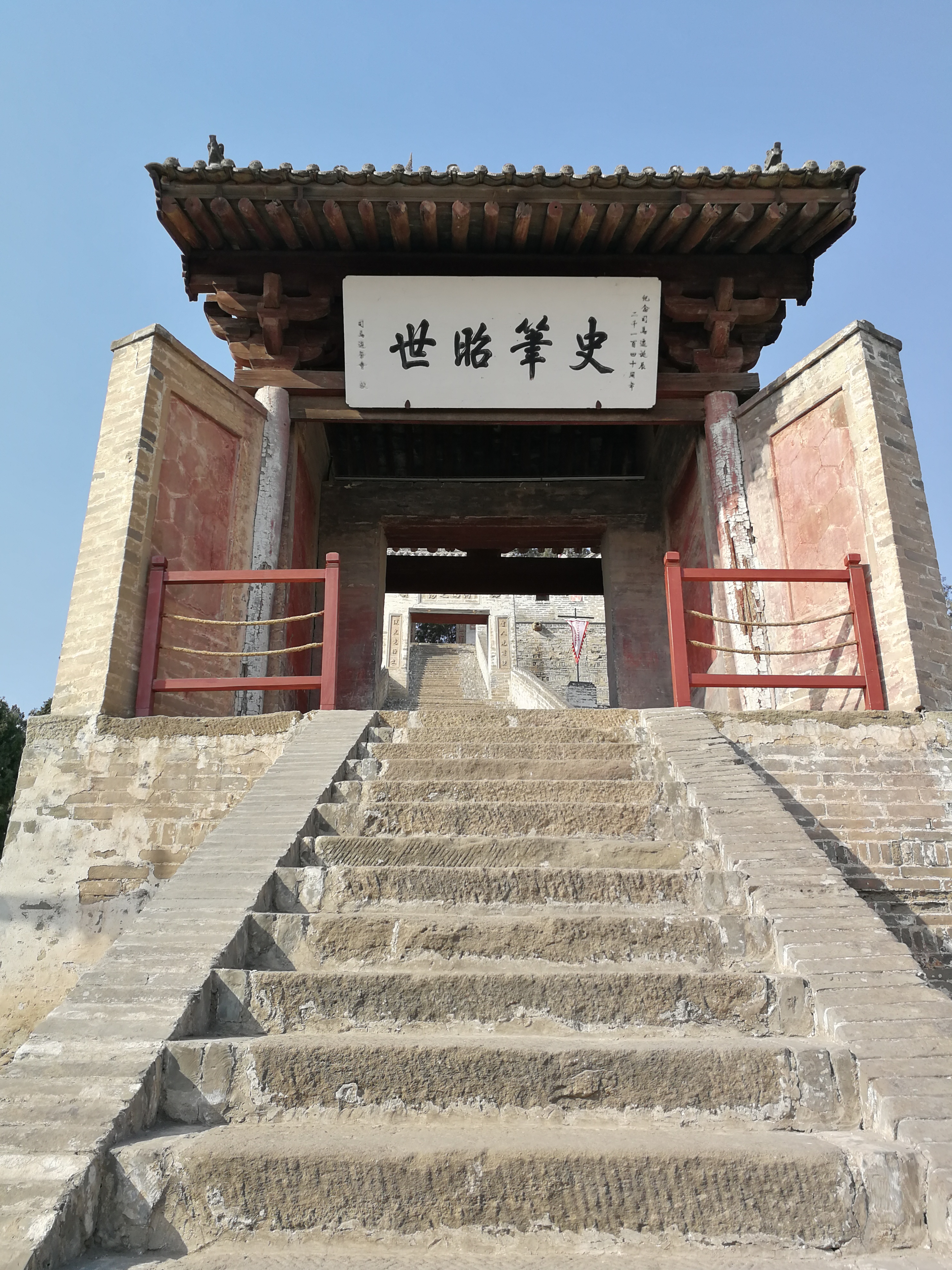 渭南市韩城市芝川镇司马迁祠